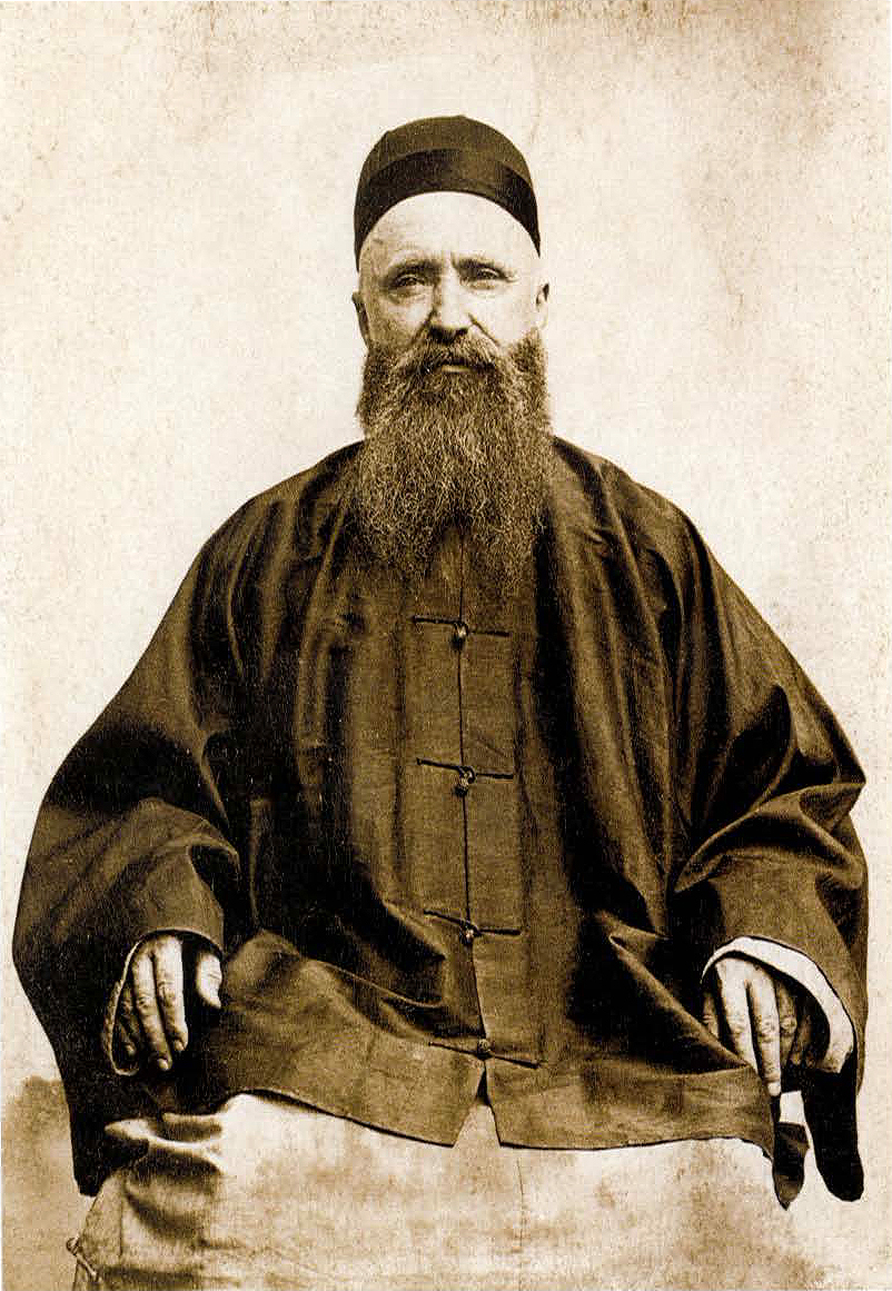 Carte postale probablement éditée lors de la canonisation de Saint Paul Denn, en 2000.